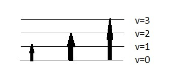 vibration